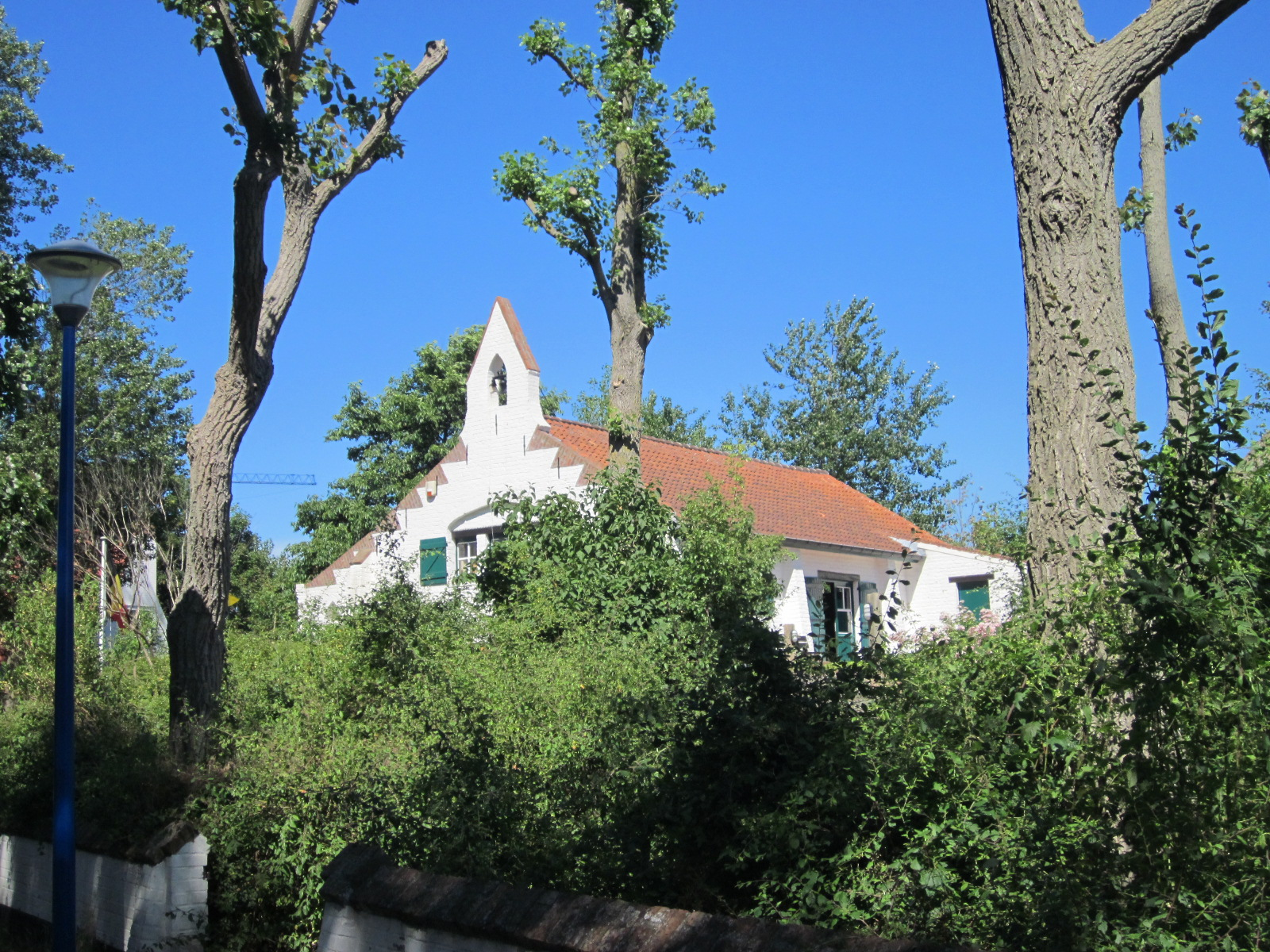 Keunekapel (1906), H. Christiaenlaan in Sint-Idesbald (Koksijde) 28″ N, 2° 36′ 58″ E